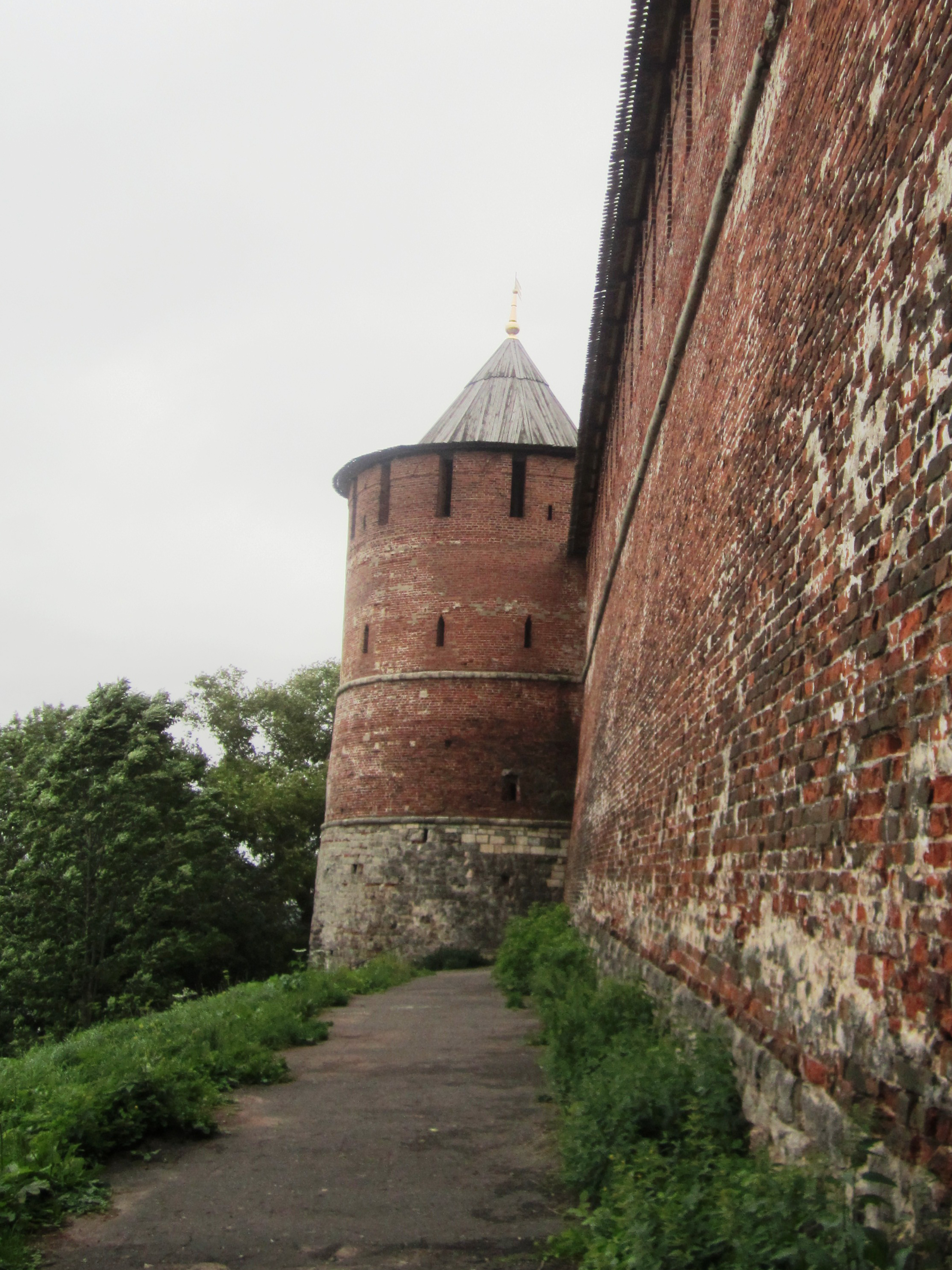 Башня Белая: Кремль, Минина и Пожарского площадь, Нижний Новгород, Нижегородская область